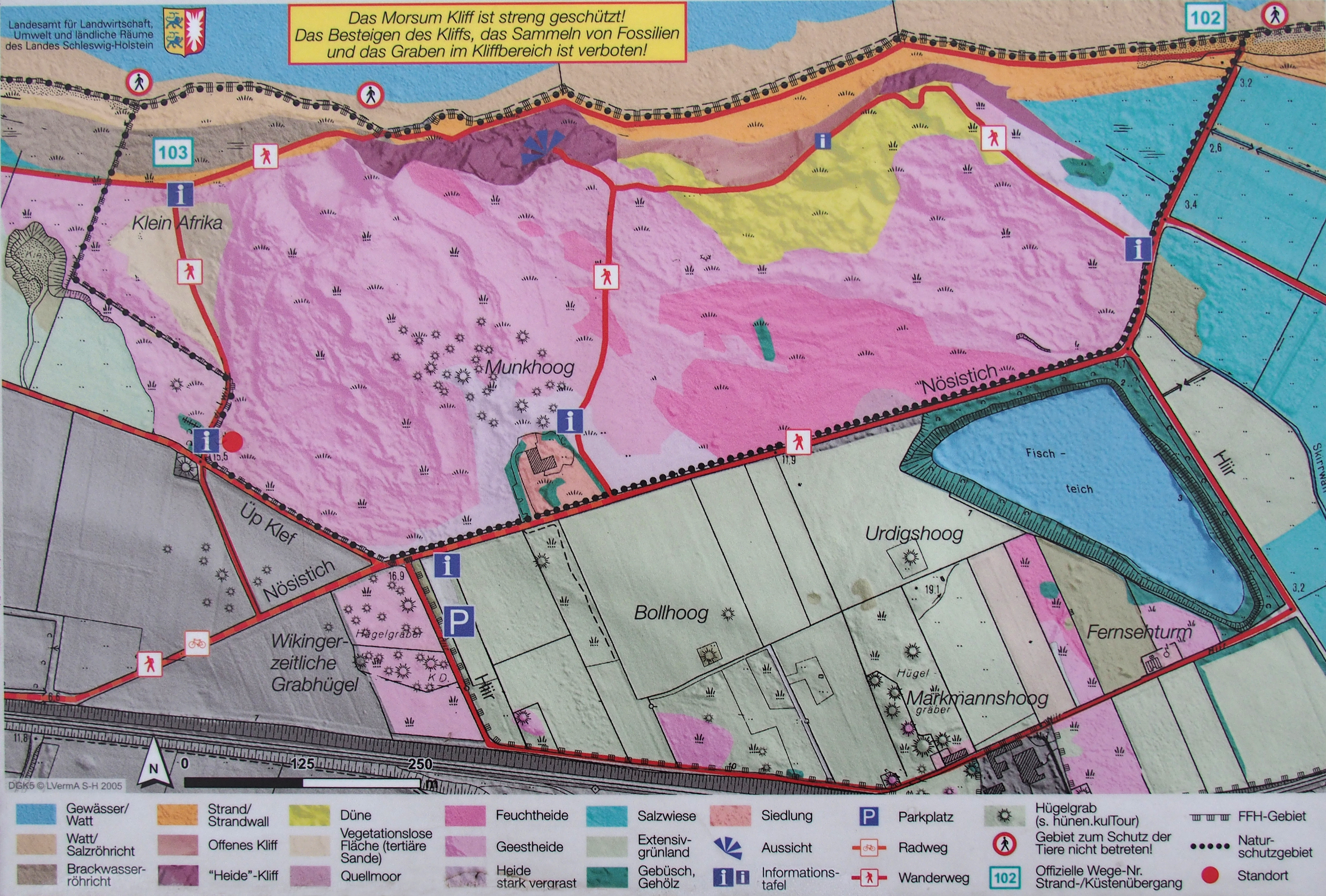 Morsum Kliff Übersichtsplan (öffentliche Infotafel)